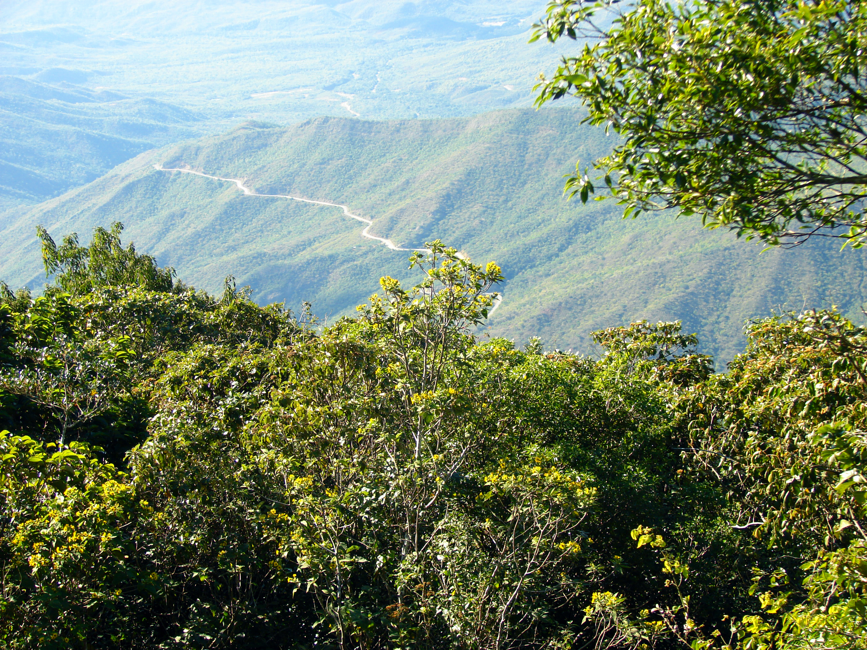 Cumbre del Cerro Galicia, Curimagua,Sierra de San Luis, Estado Falcón